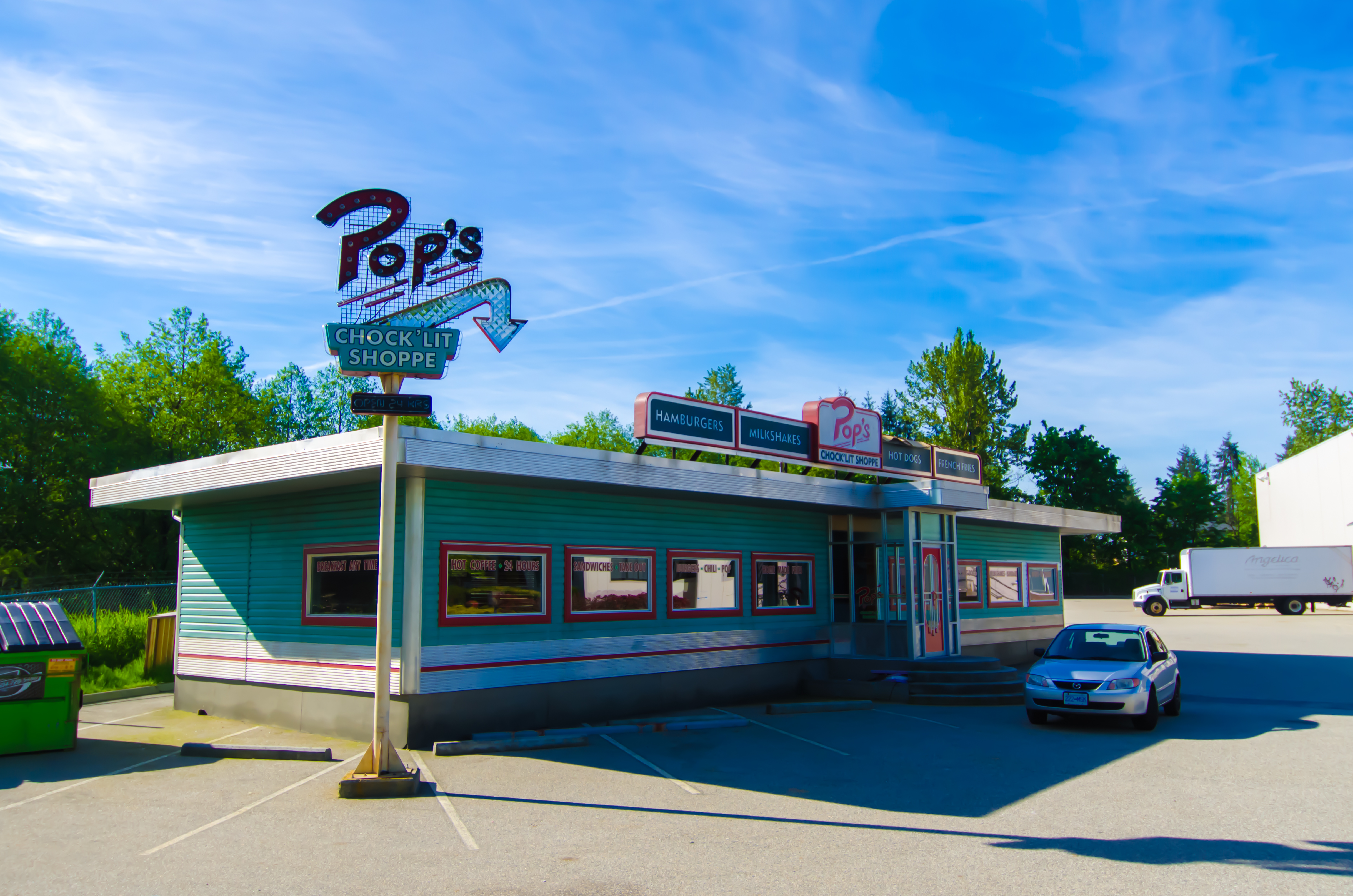 Seen in Supergirl and Riverdale.